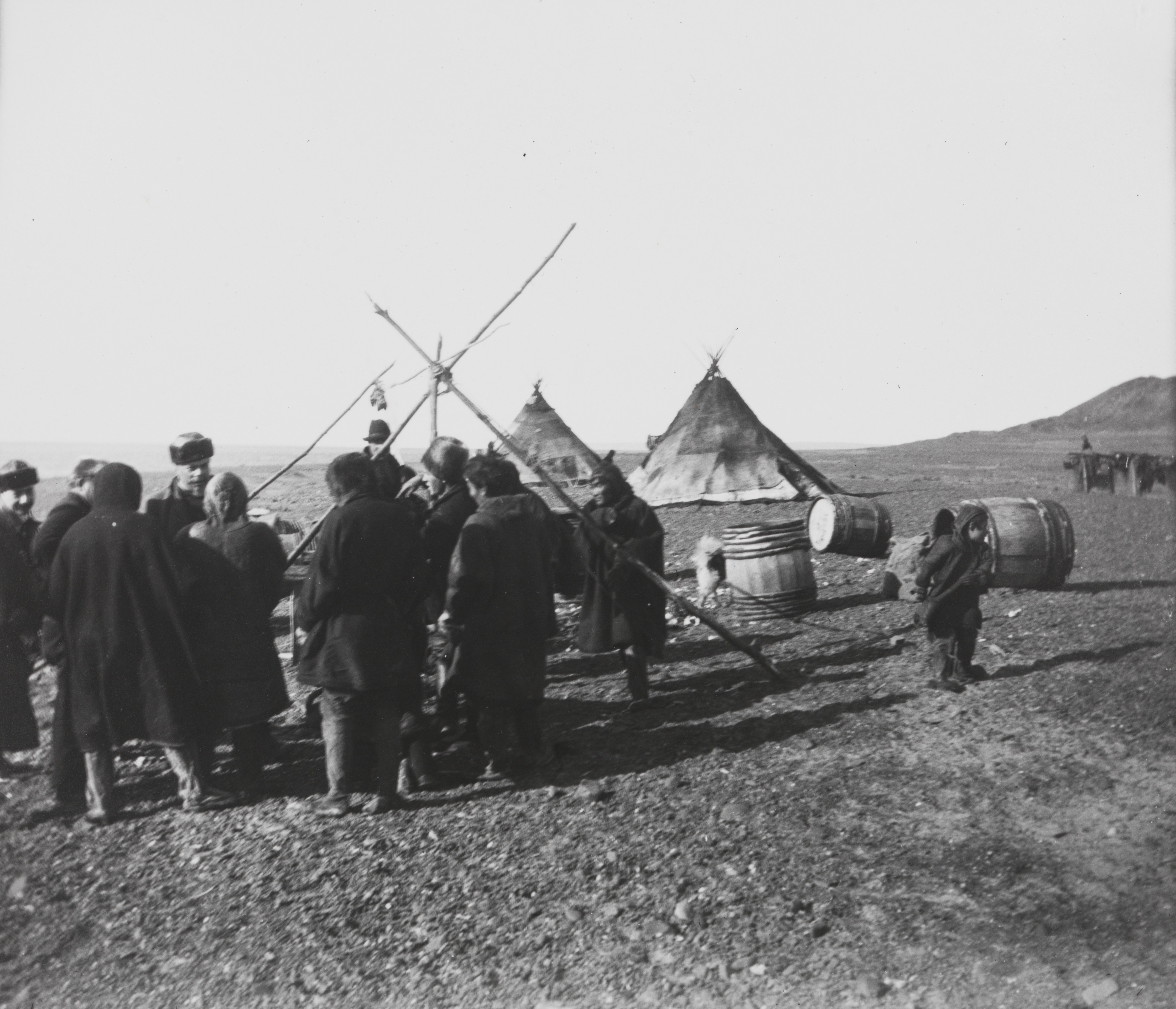 Fiskehandel ved stranden. Ett av bildene fra reisen til Sibir i perioden 2. august - 26. oktober 1913. Fridtjof Nansen fortsatte sin transsibirske reise med en liten dampbåt oppover Jenisej til Jenisejsk. Depicted place: Russland, Levenskij Pesok